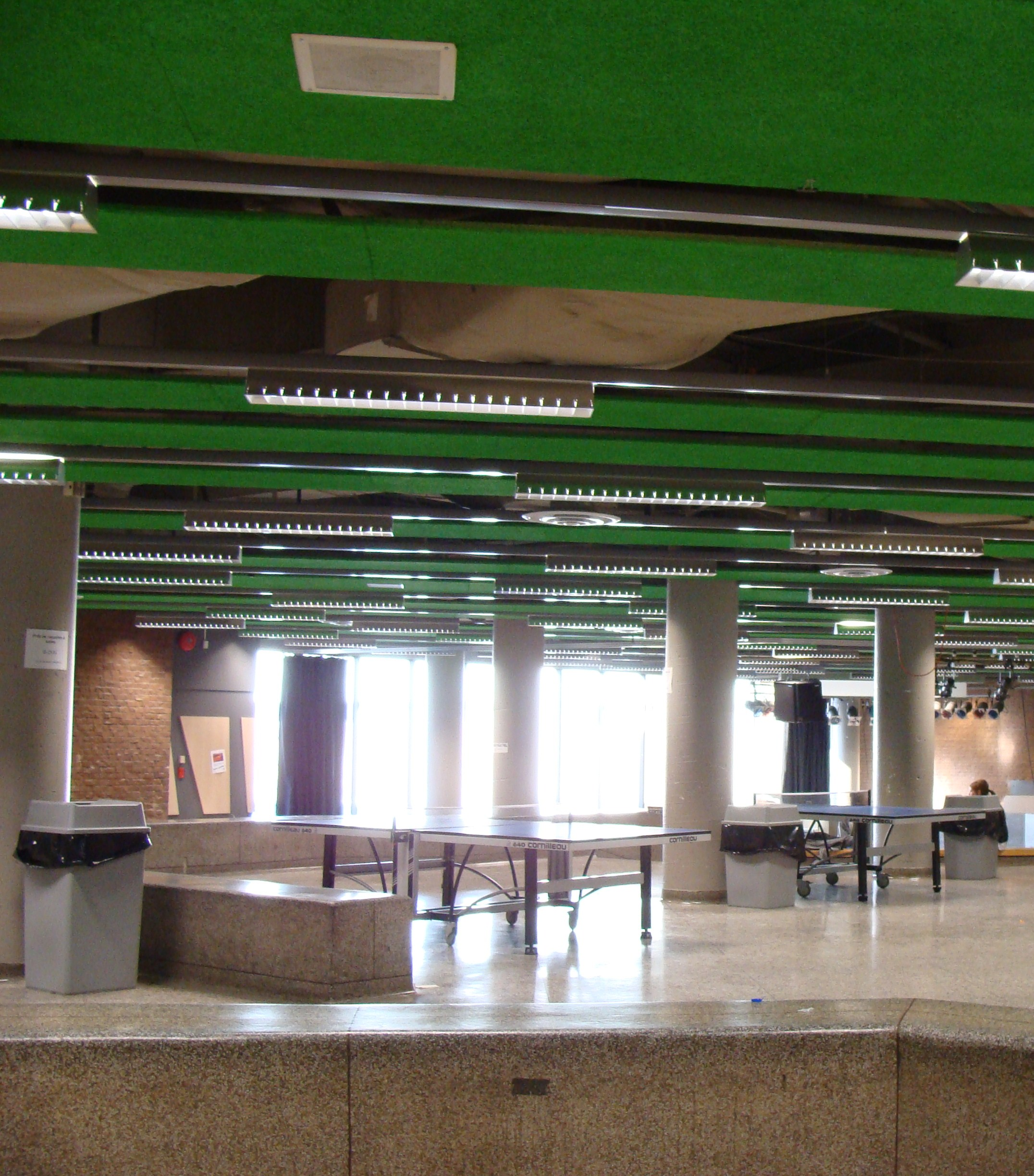 Agora (centre social) du Collège Ahuntsic, à Montréal, au Québec.